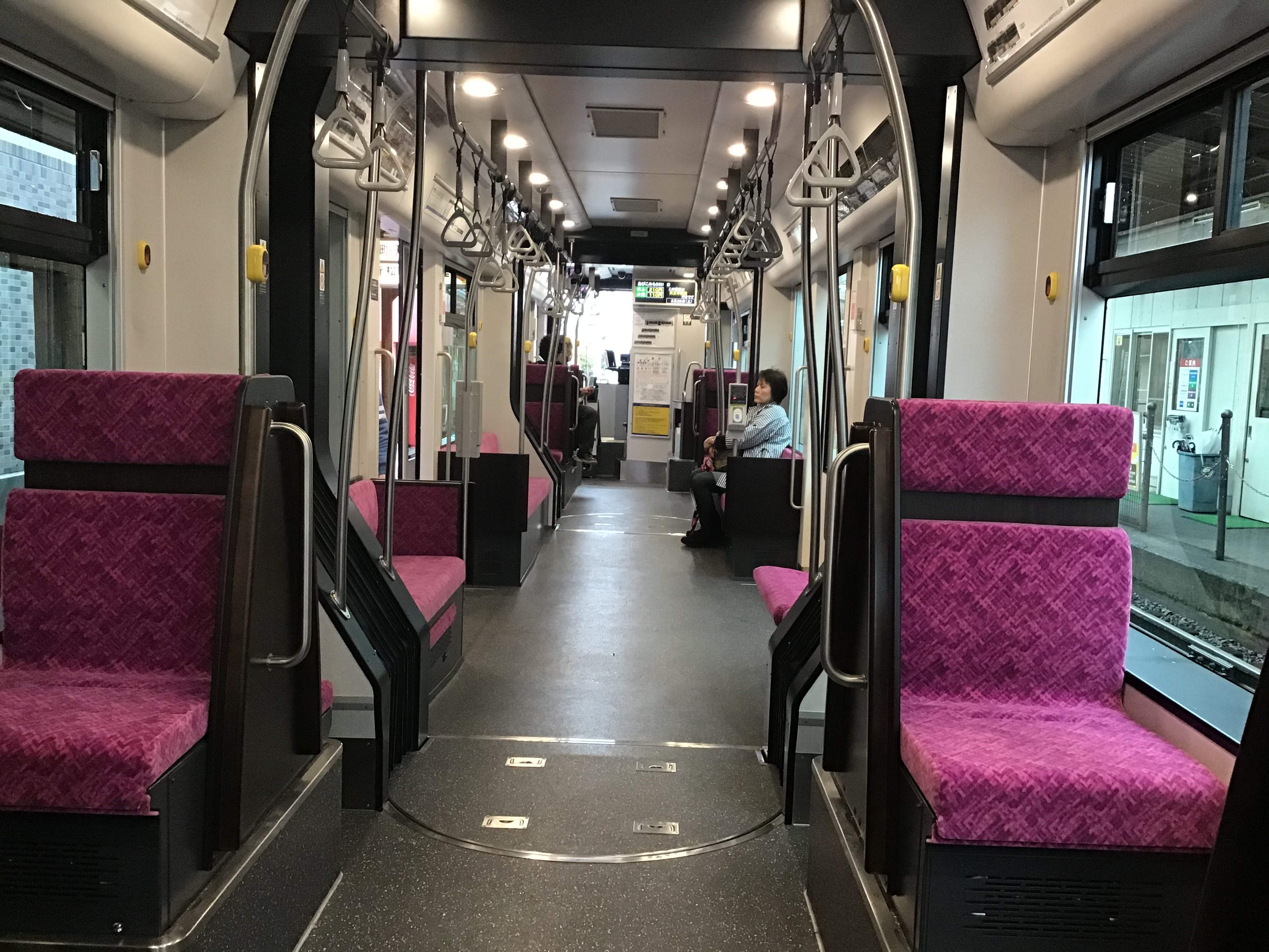 阪堺1101形車内